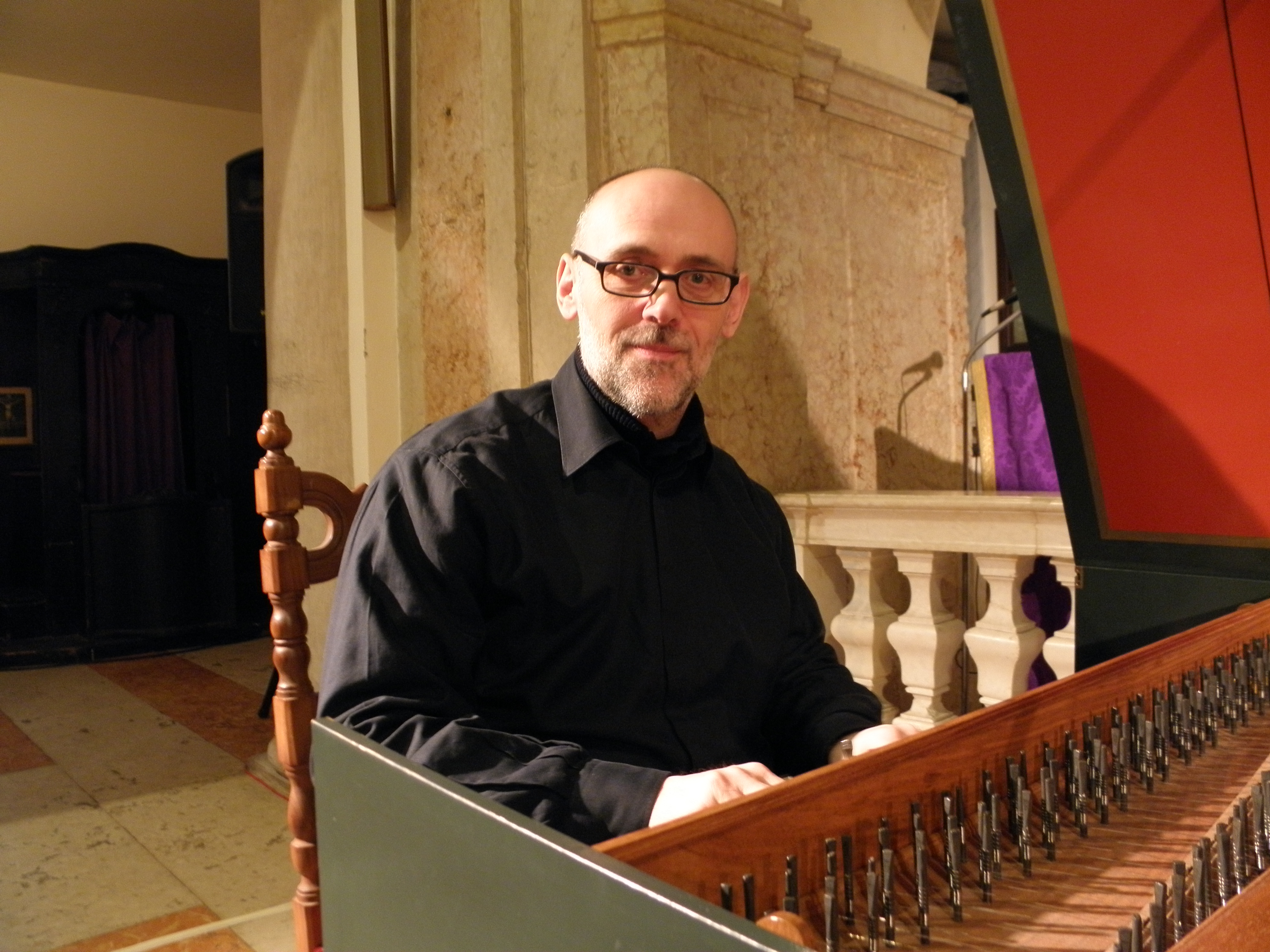 Rovigo, chiesa della Beata Vergine della Concezione, detta del Cristo: Roberto Loreggian in concerto esegue le Variazioni Goldberg (BWV 988) di Johann Sebastian Bach.